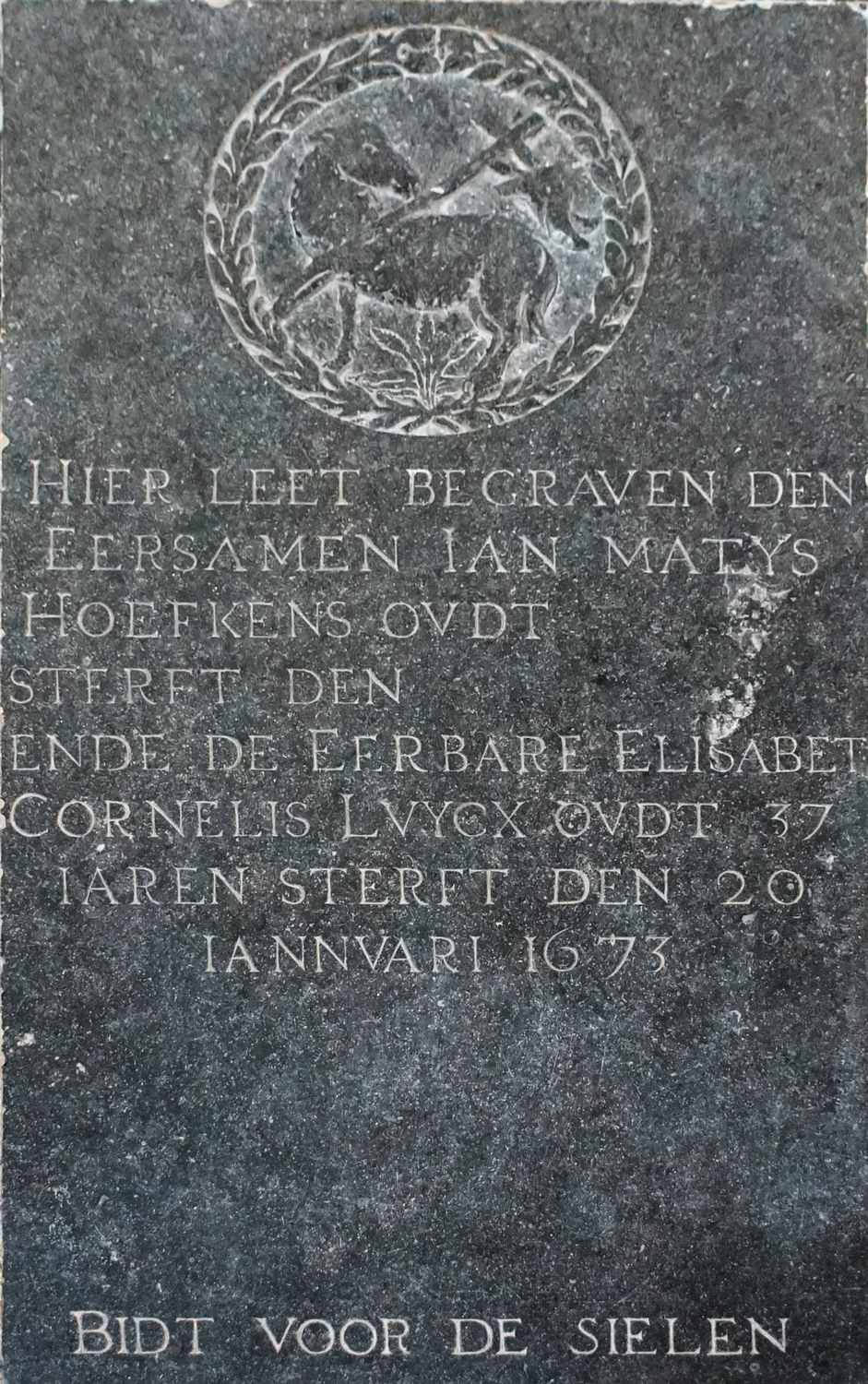 Sint-Leonarduskerk (Sint-Lenaarts). Grafsteen van Ian Matys Hoefkens (anno 1673) in het plaveisel.